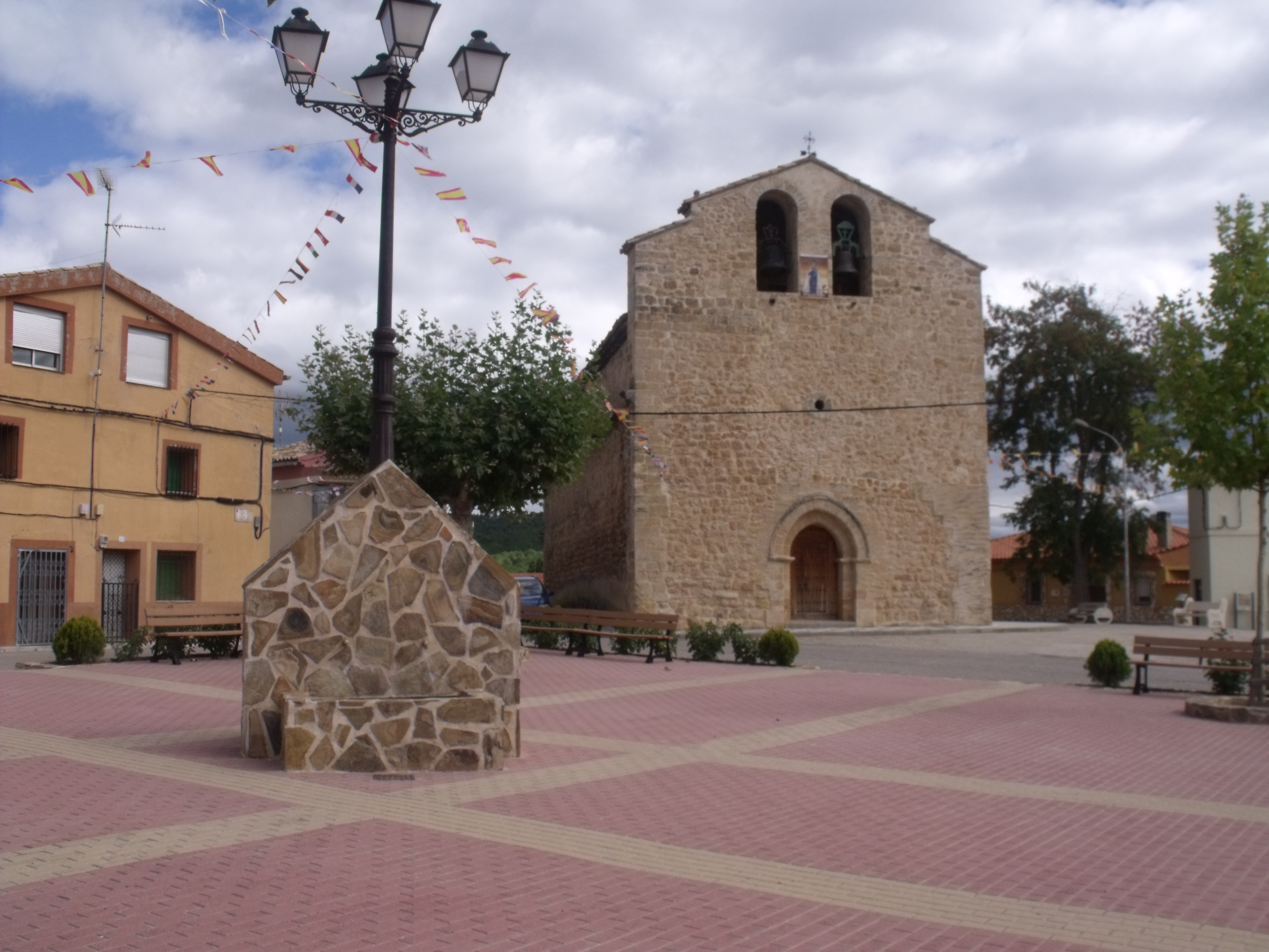 Zarzuela